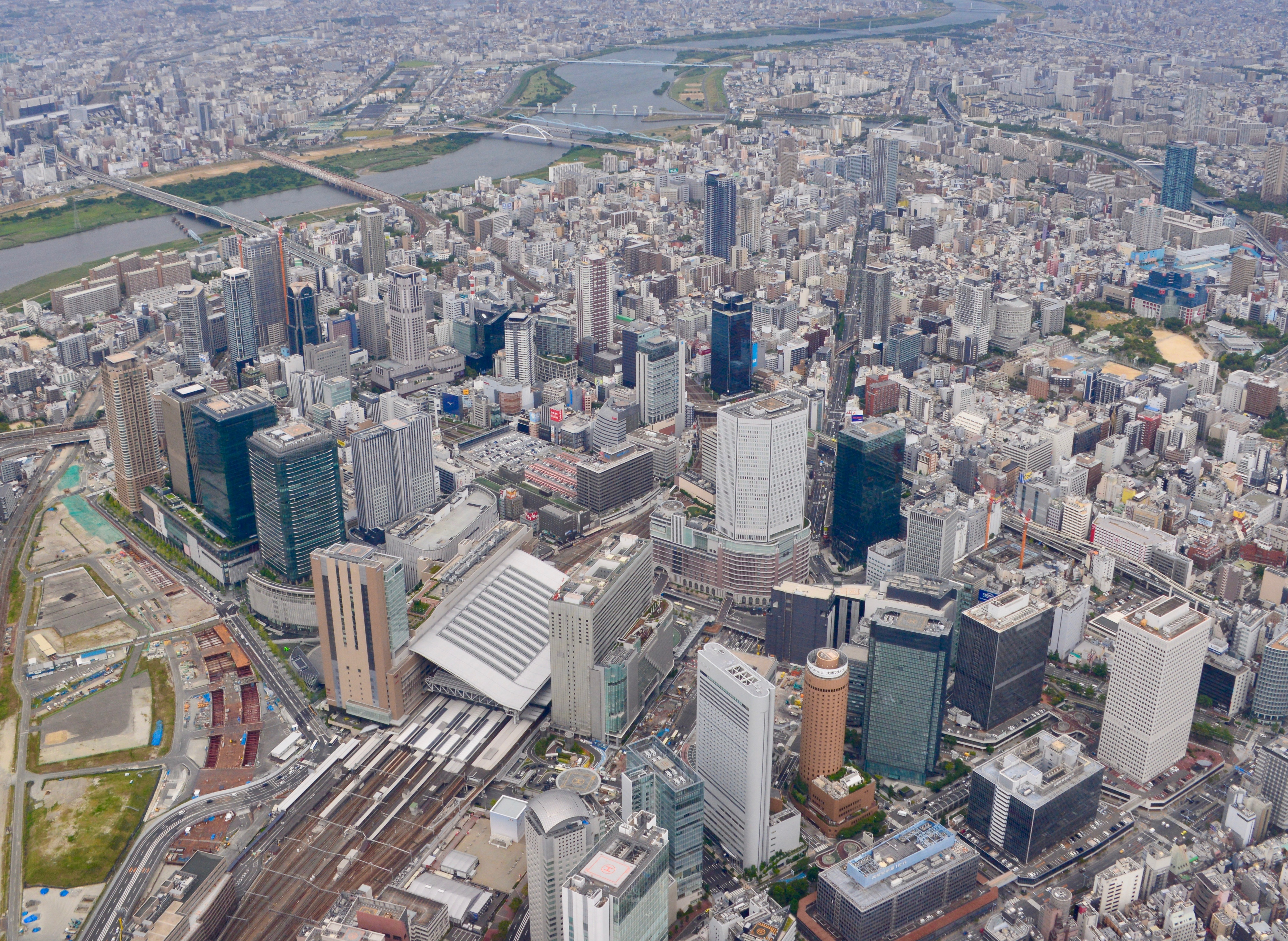 大阪市梅田周辺。伊丹空港へ着陸する機内より撮影